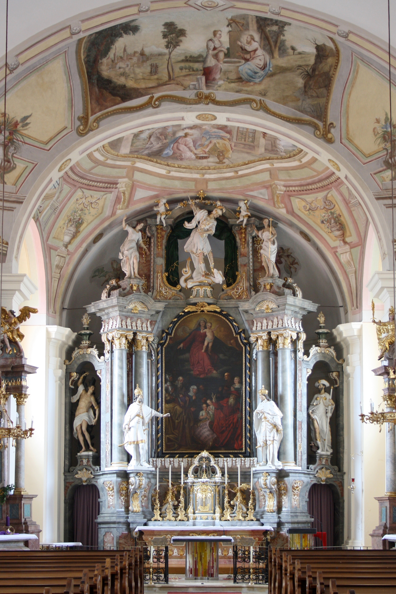 Hochaltar der alten röm.-kath. Pfarrkirche in Jois.